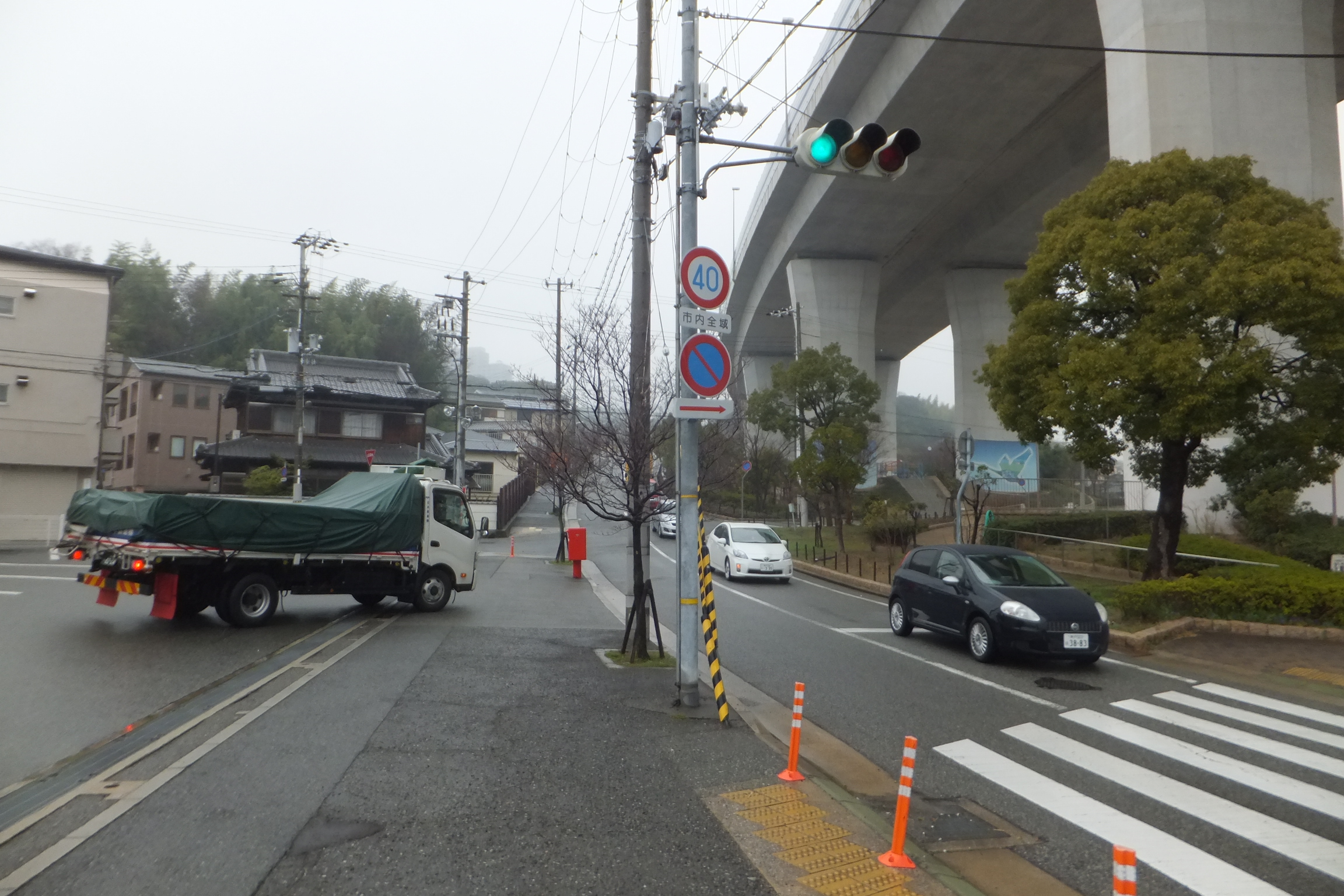 兵庫県神戸市垂水区名谷町